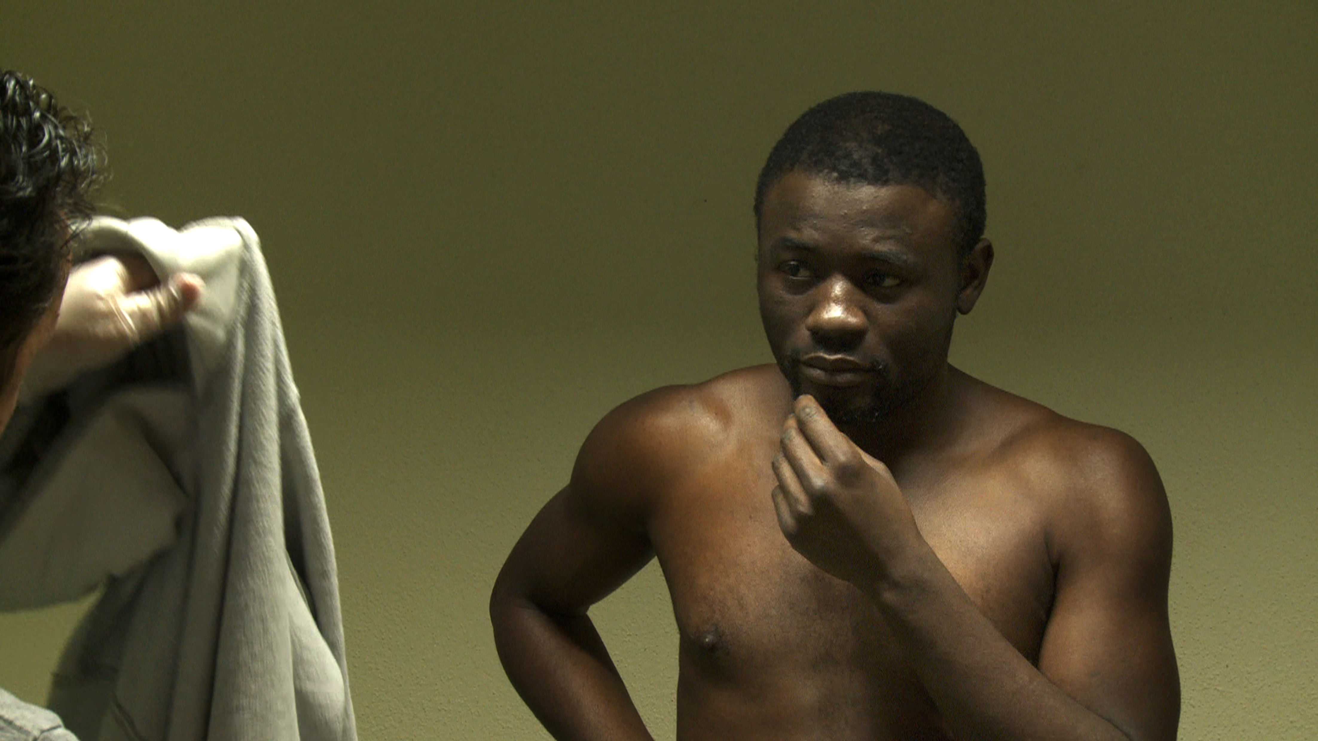 Elvis, protagoniste du film « Vol Spécial » de Fernand Melgar, se fait fouiller par la police avant son départ par vol spécial.